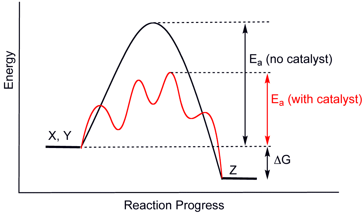 oily